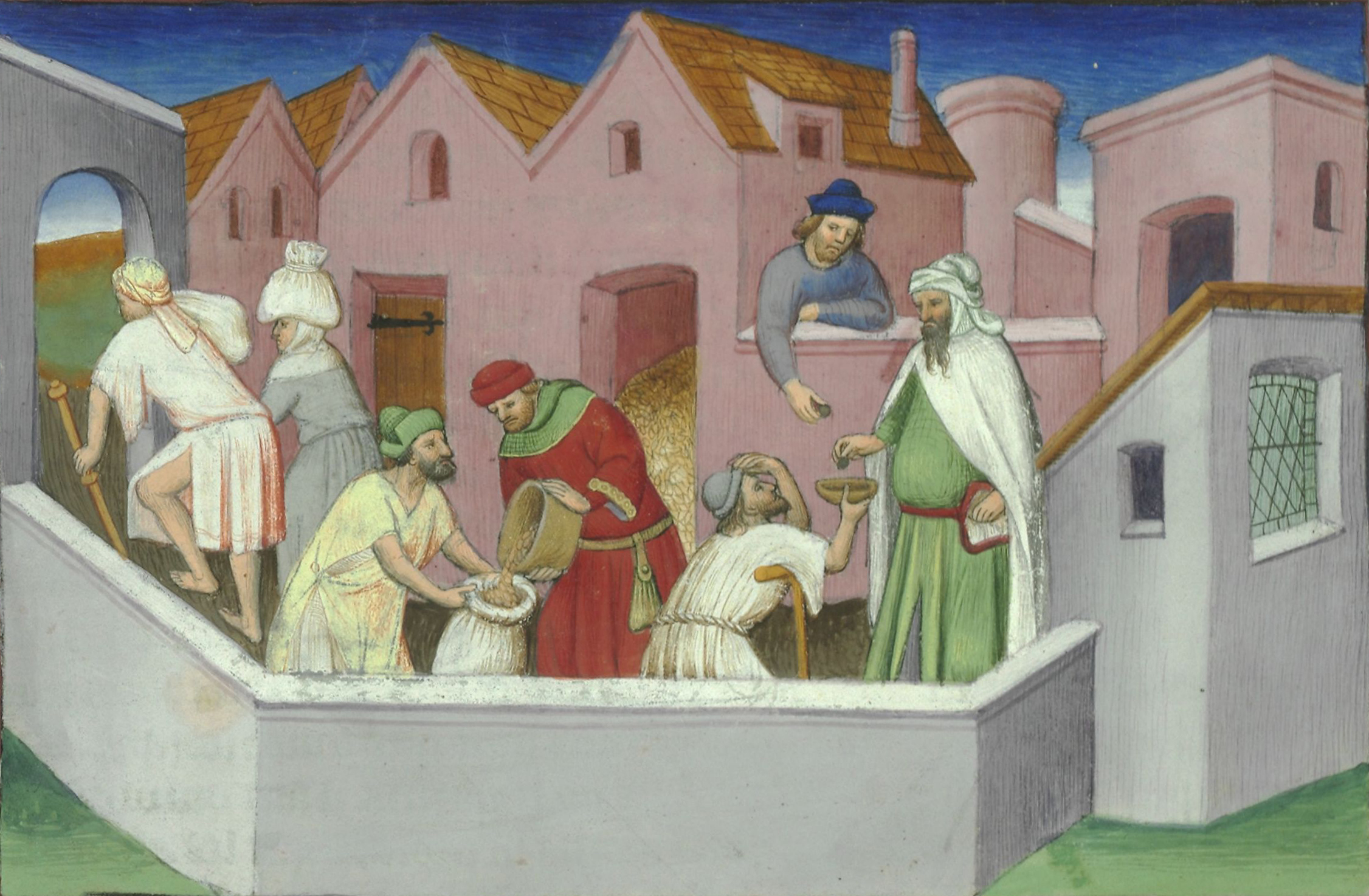 Aide aux pauvres en Chine. Le livre des merveilles de Marco Polo folio 137v.